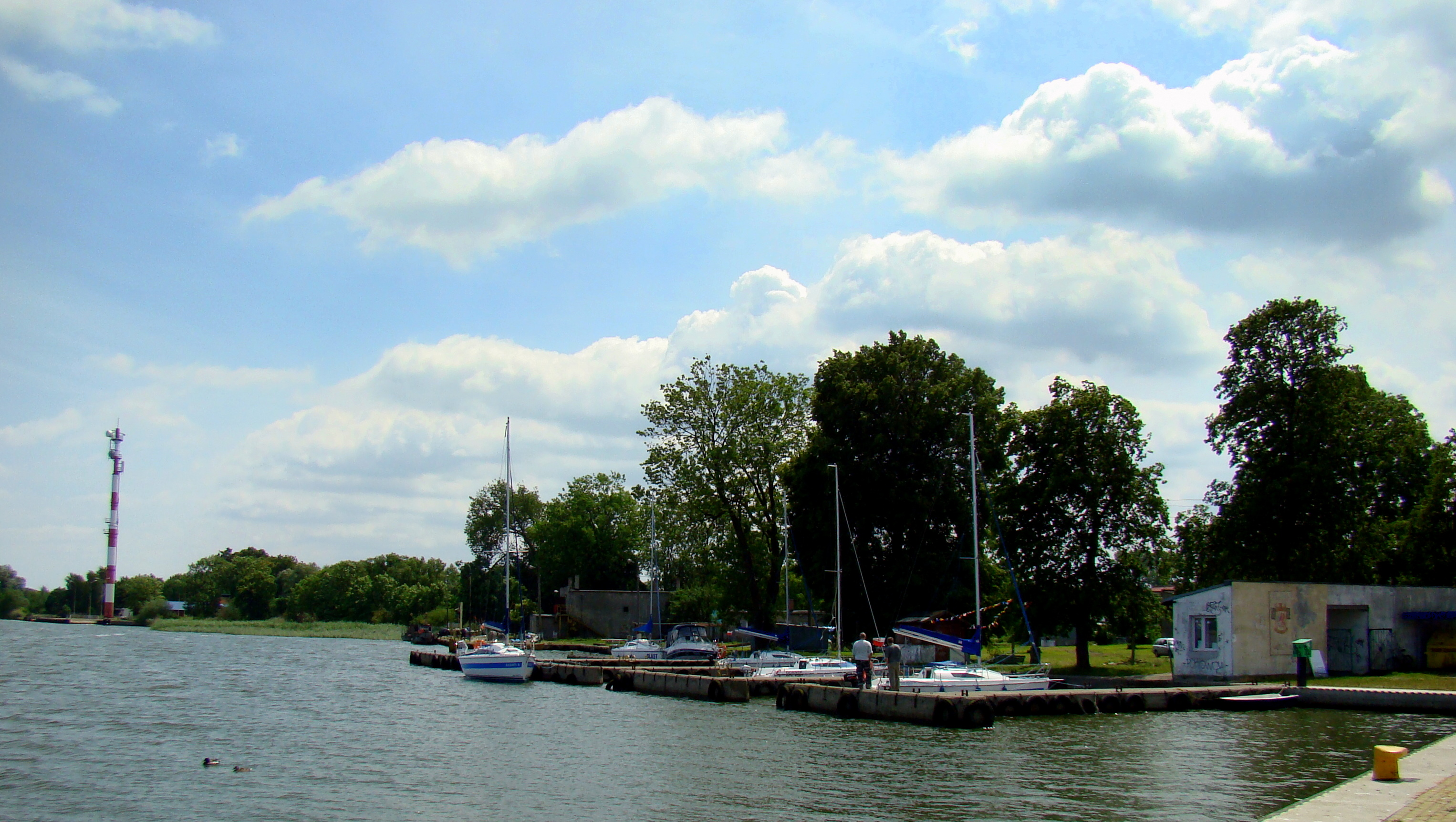 Port Nowe Warpno, Województwo zachodniopomorskie, Polska